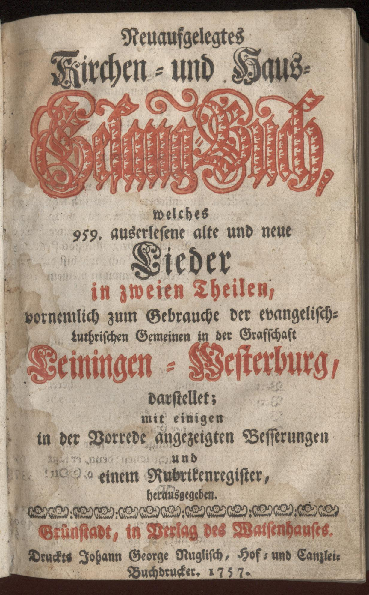 Grünstadter Gesangbuch, Titelblatt 1757